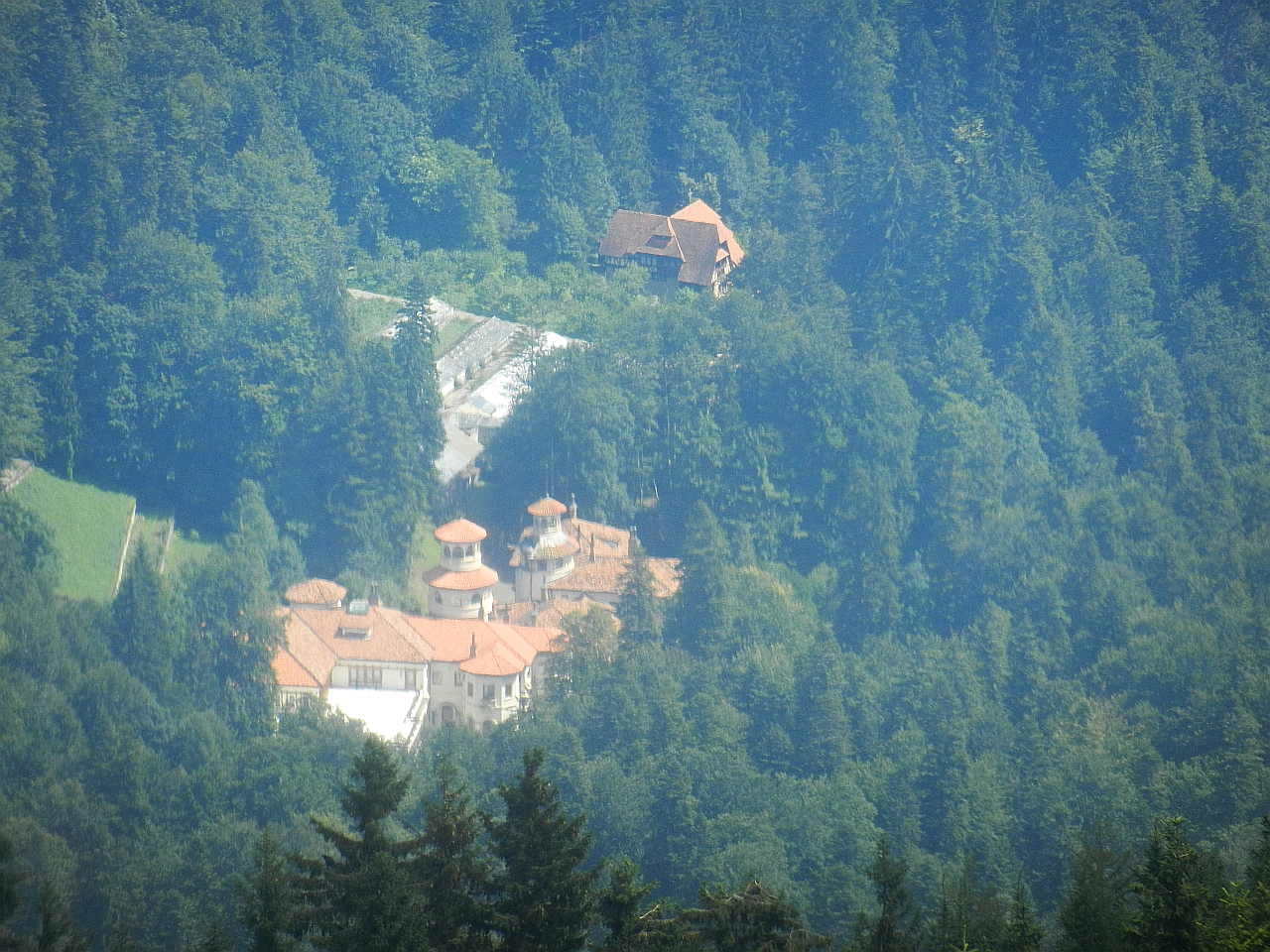 Castelul Foișor (Casa de vânătoare) 03